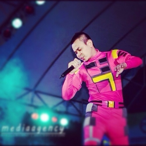 ท๊อฟฟี่ ศิวดล จันทนเสวี